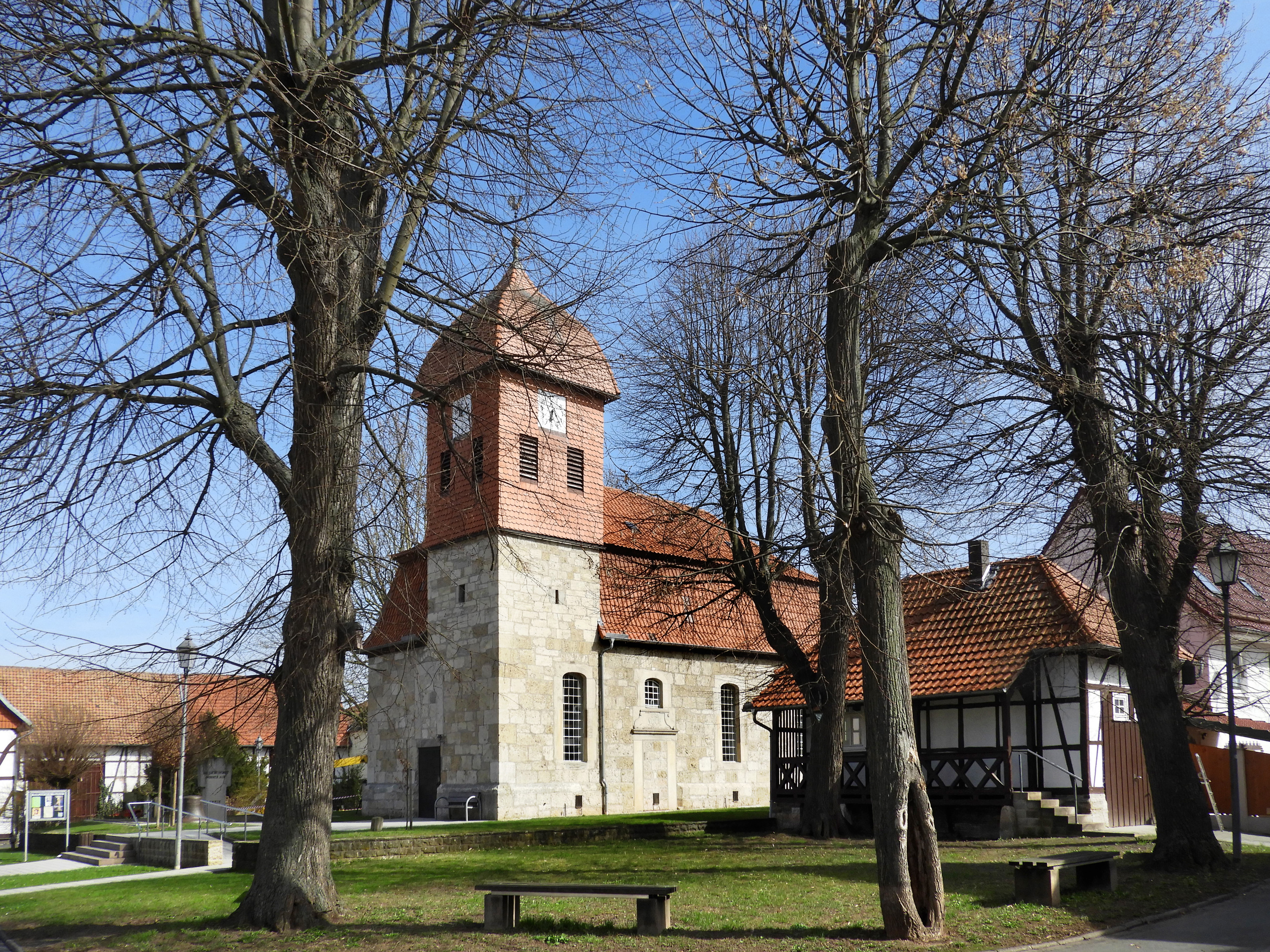 Die auf dem Anger im Dorfkern gelegene Filialkirche der Niederhoner Kirche ist ein Bau aus dem frühen 16. Jahrhundert. Die 1501 erstmals erwähnte Kirche ist 1737, laut Datierung über dem zugemauerten Portal an der Südseite, durch umfangreiche Arbeiten zu einer schlichten Saalkirche in barocker Form geändert worden. Der mit Linden umgebene, halbkreisförmige Anger weist als Besonderheit eines der wenigen erhaltenen Musikantenhäuschen auf. Die Angerlinde vor dem Musikantenhäuschen wurde in 1936 als Kulturdenkmal ausgewiesen und auch das gesamte Ensemble ist wegen seiner geschichtlichen Bedeutung als Zeugnis des bäuerlichen Lebens denkmalgeschützt. Denkmaltopographie Bundesrepublik Deutschland. - Kulturdenkmäler in Hessen. Werra-Meißner-Kreis 2, Stadt Eschwege. Susanne Jacob in Zusammenarbeit mit Thomas Wiegand. Braunschweig, Wiesbaden: Vieweg. 1992. ISBN 3-528-06241-X. S. 317 f.